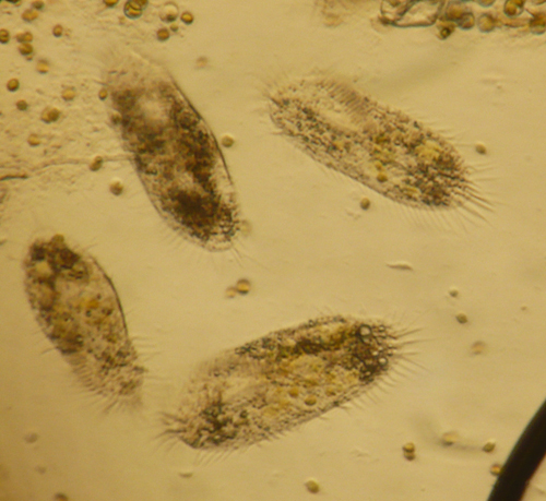 Stylonychia observed under a dissecting microscope (x230)